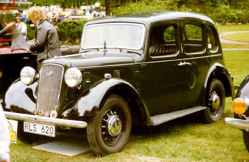 Austin Ten Cambridge 4-Door Saloon 1938